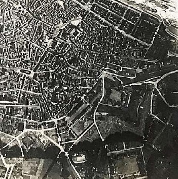 Zur Orientierung: in der linken unteren Ecke der Augustusplatz, Bildmitte rechts die Zitadelle, rechte Ecke oben die Einfahrt zum Winterhafen.